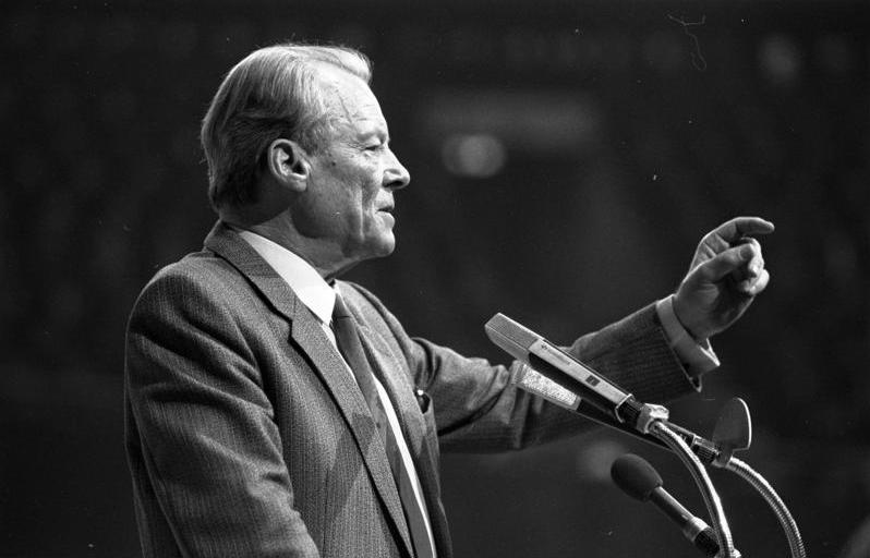 22.1.1983 SPD-Wahlparteitag in der Dortmunder Westfalenhalle